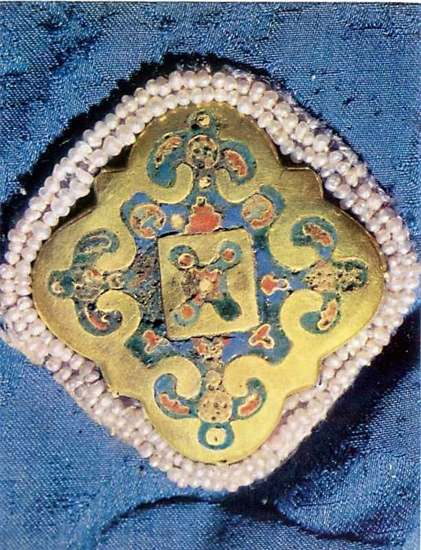 Золота дробниця з перегородчастими емалями